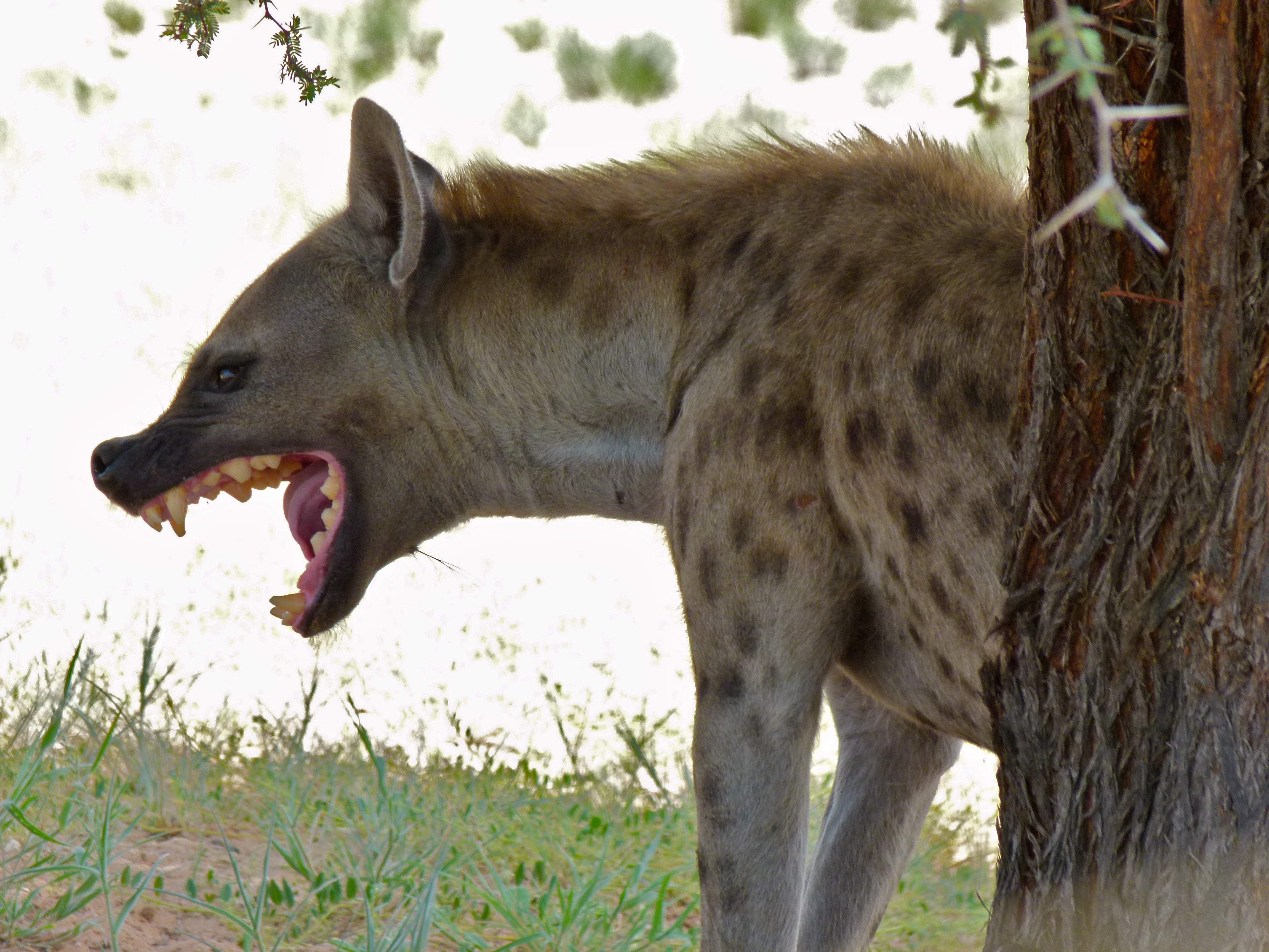 Auob Riverbed, Kgalagadi Transfrontier Park, SOUTH AFRICA